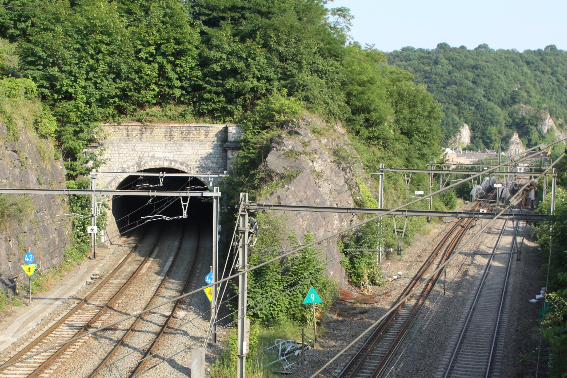 Y vu Rivage. Den Tunnel vu Liotte op der Linn 42 (lénks). Riets d'Linn 43 mat der Bréck iwwer d'Amblève. Liotte Tunnel Liotte Rivage